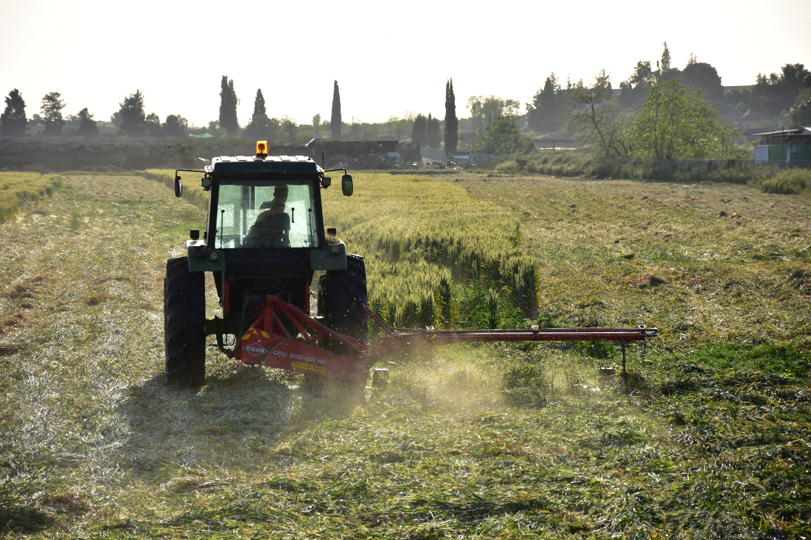 טרקטור בשעת קצירה